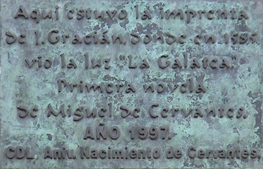 Placa de bronce en recuerdo de la primera edición de La Galatea de Miguel de Cervantes, en la imprenta de Juan de Gracián, situada en el actual número 11 de la calle Libreros de Alcalá de Henares (Comunidad de Madrid - España). El texto dice "Aquí estuvo la imprenta de J. Gracián, donde en 1585, vio la luz "La Galatea". Primera novela de Miguel de Cervantes. AÑO 1997. CDL Aniv. Nacimiento de Cervantes."